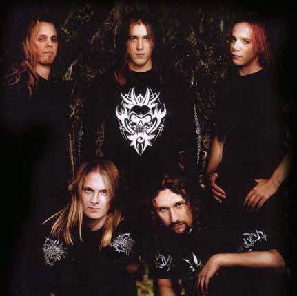 Sonata Arctica